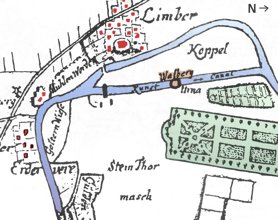 Lage des Walberges von Burg Limmer mit Herrenhäuser Gärten, Leine, Kunstkanal, Dorfstelle Limmer, nachträglich eingefärbt